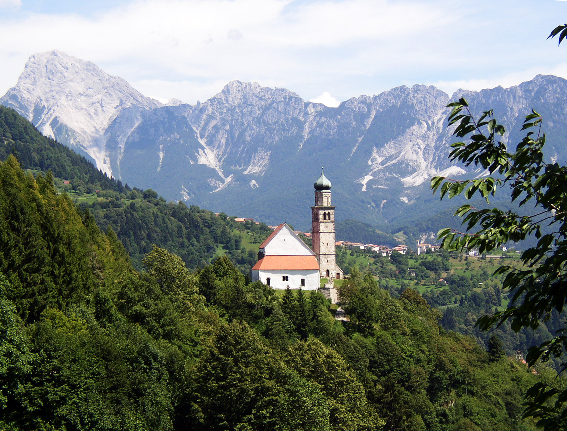 La Pieve di Zuglio con sullo sfondo le Alpi Carniche, Italia.